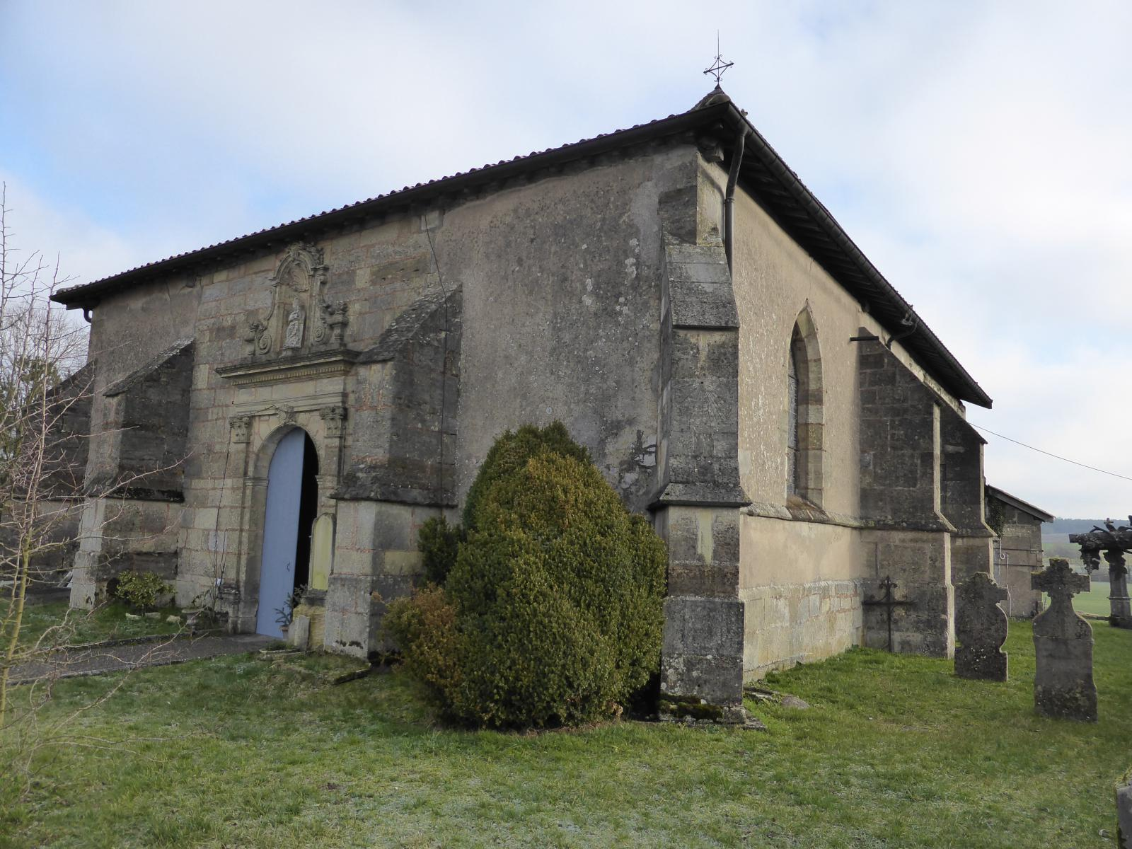 édifice de 1757 - source « POUILLÉ DU DIOCÈSE DE VERDUN - tome III », Abbés N. ROBINET, J.-B.-A GILLANT, L. Laurent Fils, 1904, 835 p., p. 504